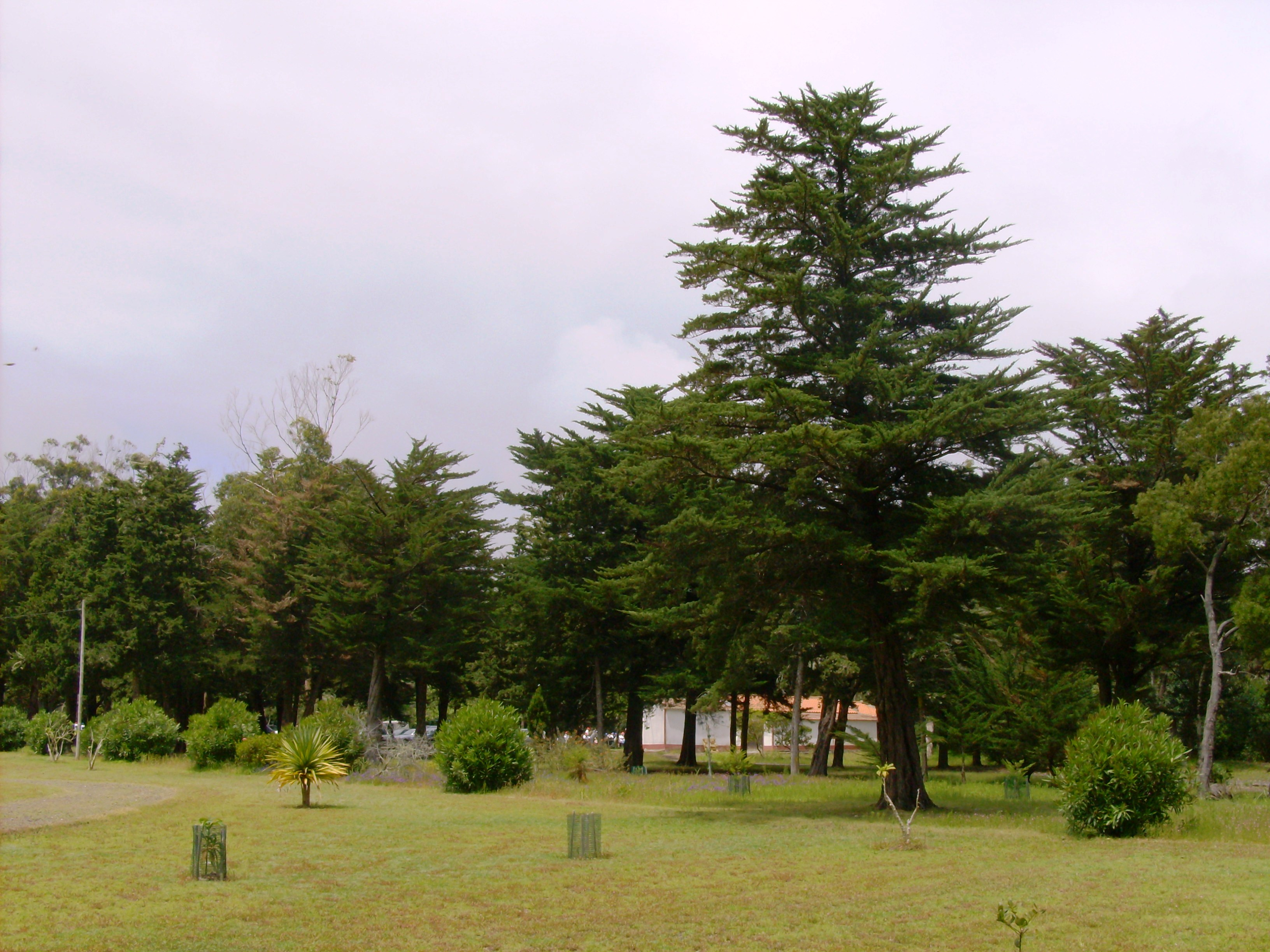 Reserva Florestal de Recreio de Valverde, Ilha de Santa Maria (Açores), Portugal.